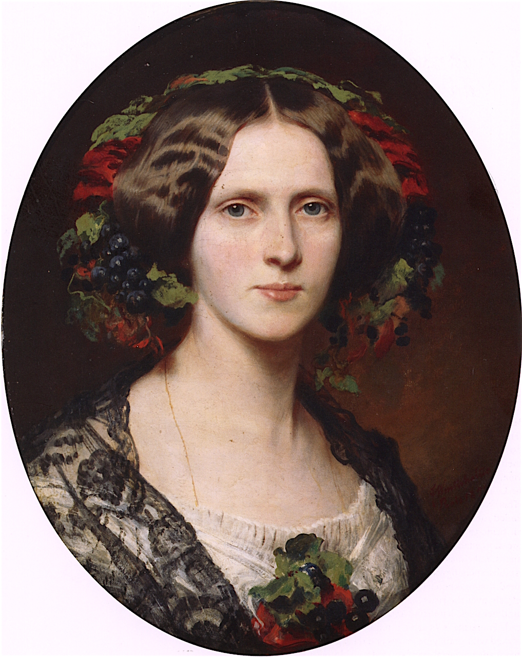 Franziska (Fanny), Princess Biron of Curland, Madame von Boyen